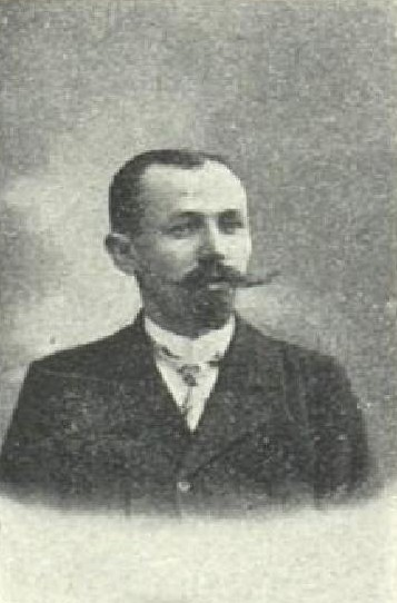 František Máša (1873-1910), rakouský a český rolník a politik